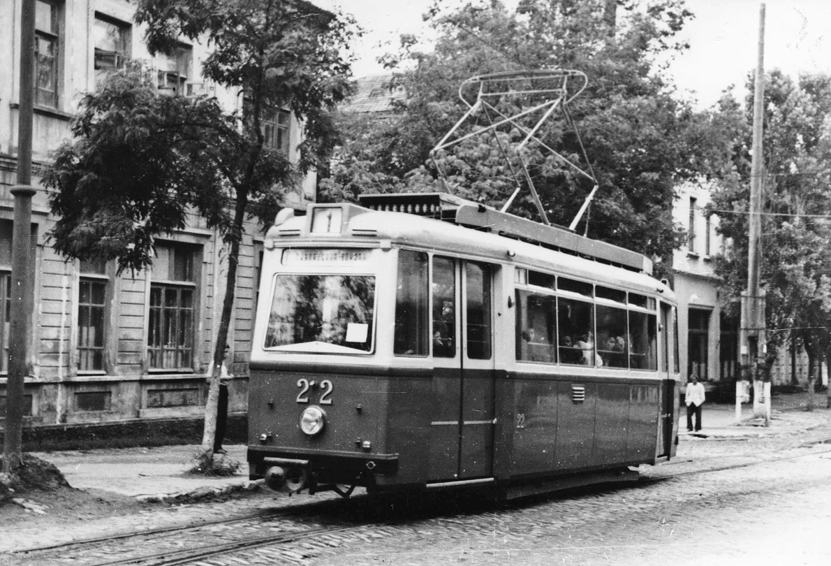 LOWA ET54 № 22 — маршрут 1. Улица Штефана Великого, Кишинёв